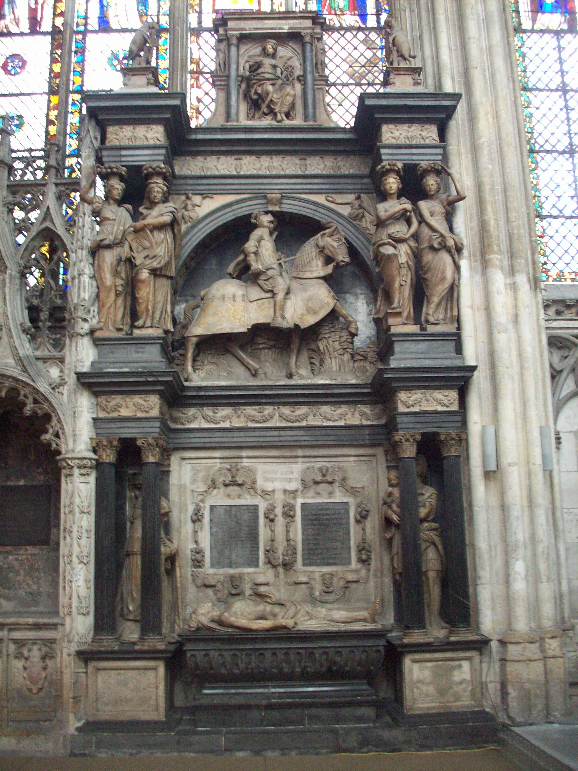 Tombeau de Louis de Brézé, en albâtre et marbre noir du milieu du XVIe siècle.